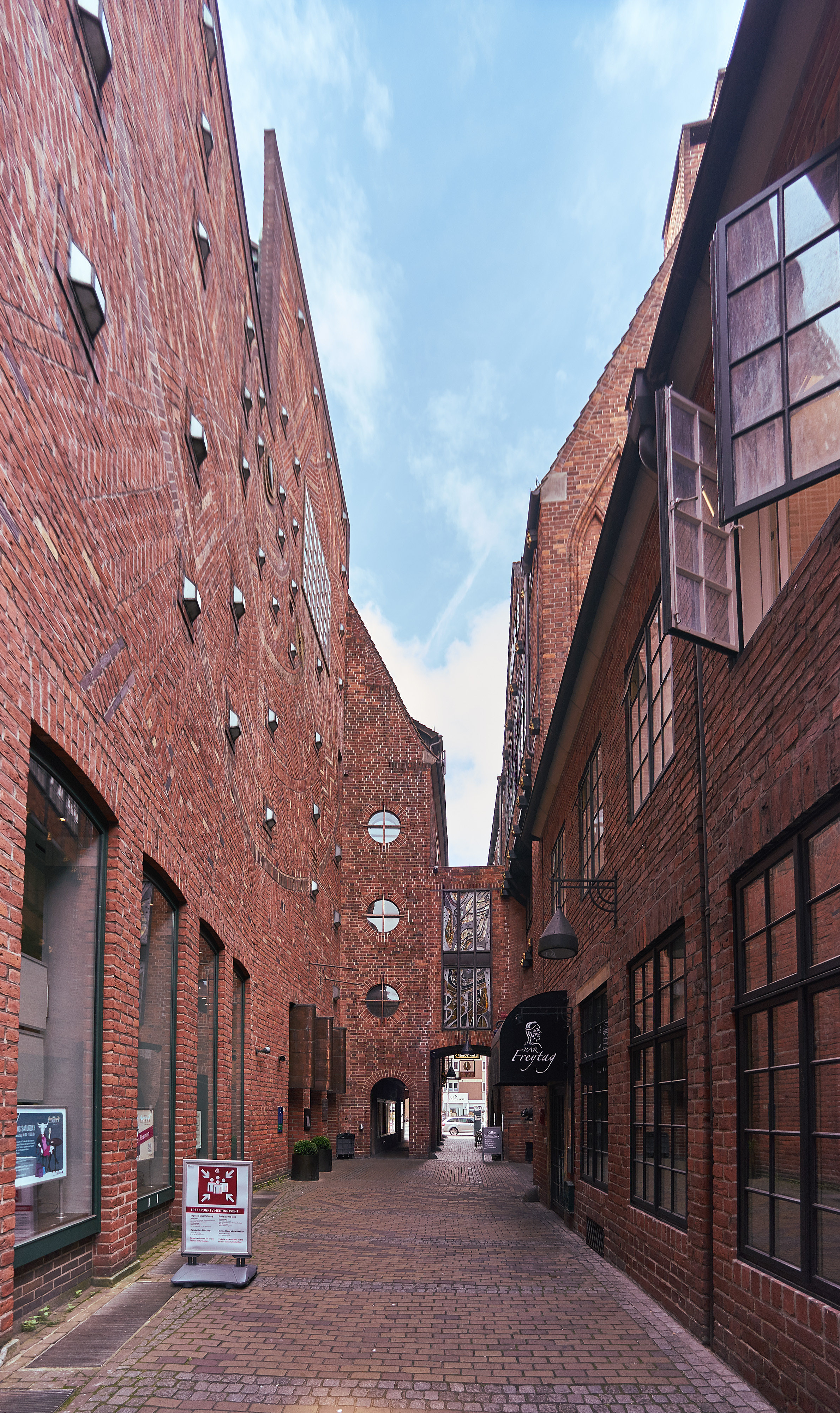 Haus Atlantis in Bremen, Böttcherstraße 2. Fassade von Ewald Mataré (links). Blick Richtung Martinistraße.Das abgebildete Objekt ist ein geschütztes Kulturdenkmal in der Freien Hansestadt Bremen, mit der Nr. 1498 beim Landesamt für Denkmalpflege registriert.